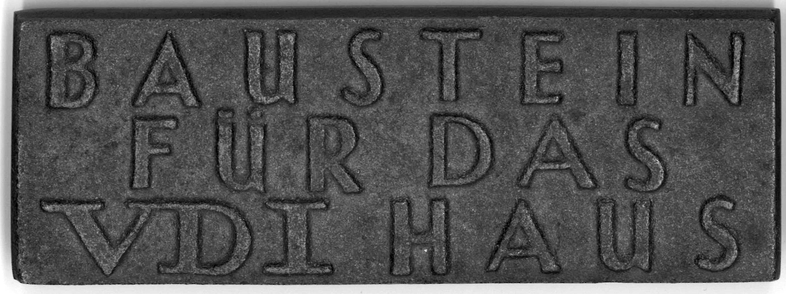 Gusseiserner Baustein für das 2. Düsseldorfer VDI-Haus 1967, Bausteinsammlung